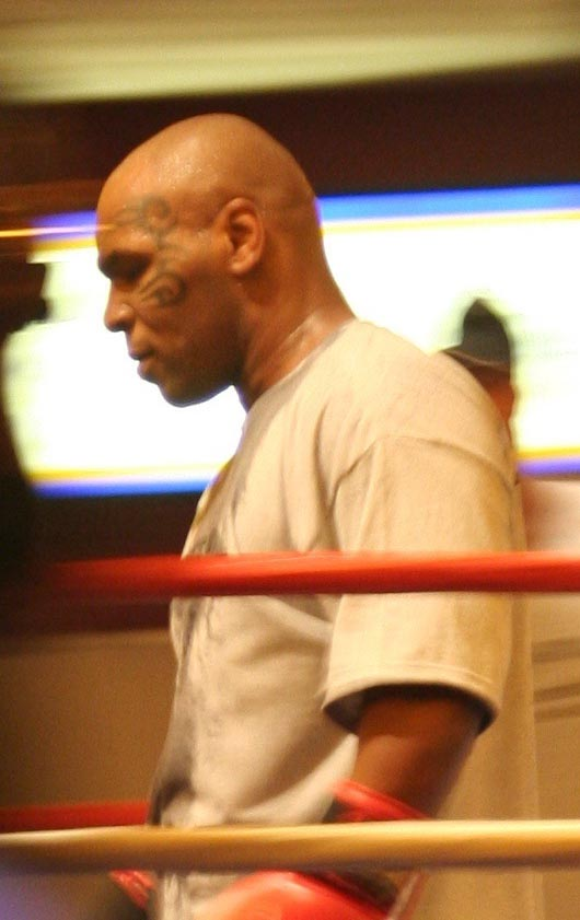 Boxer Mike Tyson in the ring at Las Vegas, Nevada, ca. October 2006.